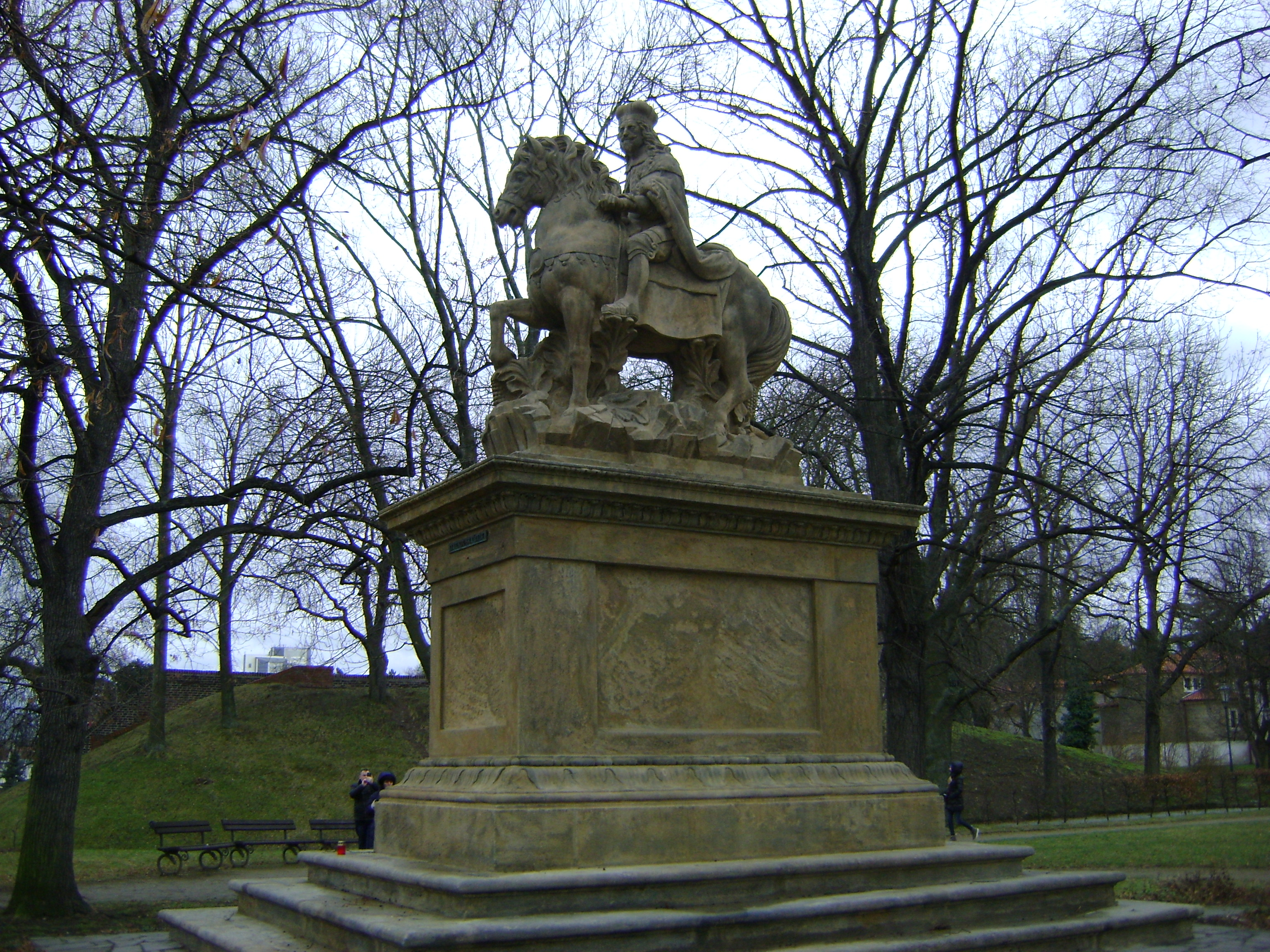 Пам'ятники Вацлаву у Празі.